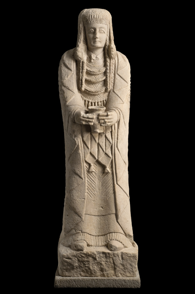 Dama Oferente del Cerro de los Santos (Cultura Ibérica). Número de inventario: 3500.